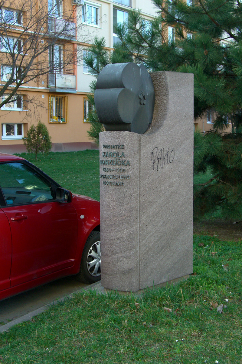 Pomnik Karola Hanzlicka, Bratislava/Ruzinov/Posen